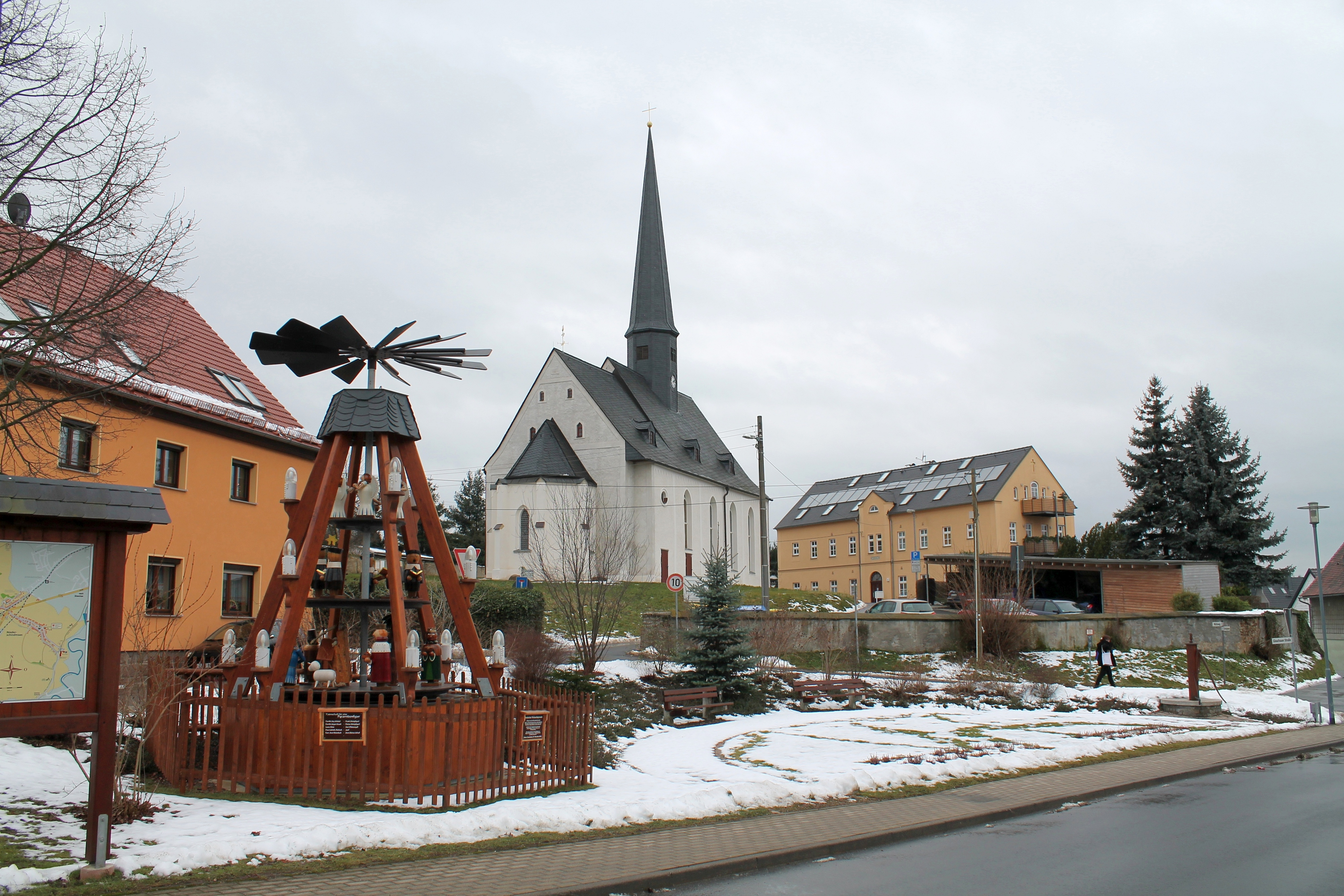 Ortspyramide und Kirche in Dennheritz